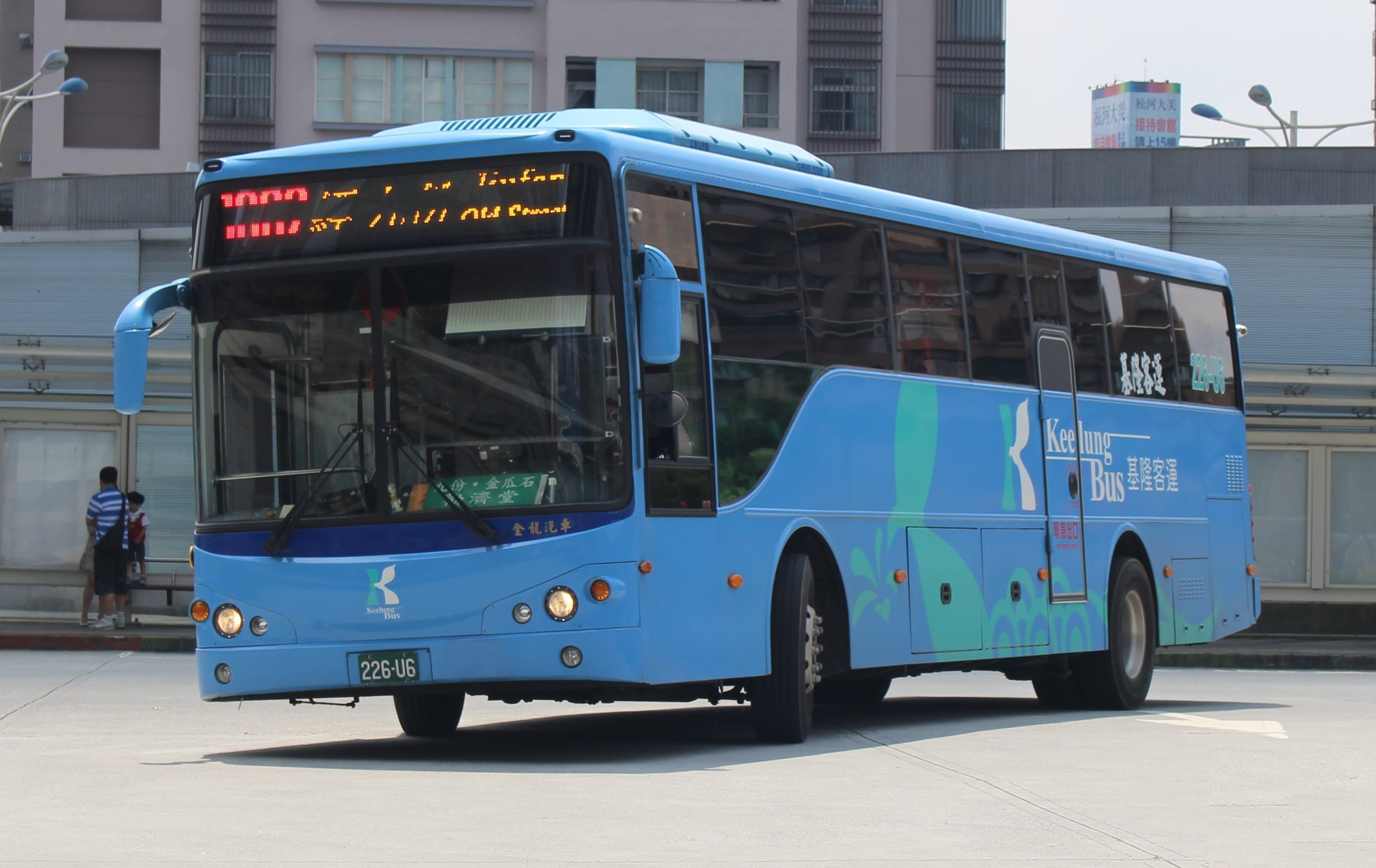 基隆客運 226-U6 1062